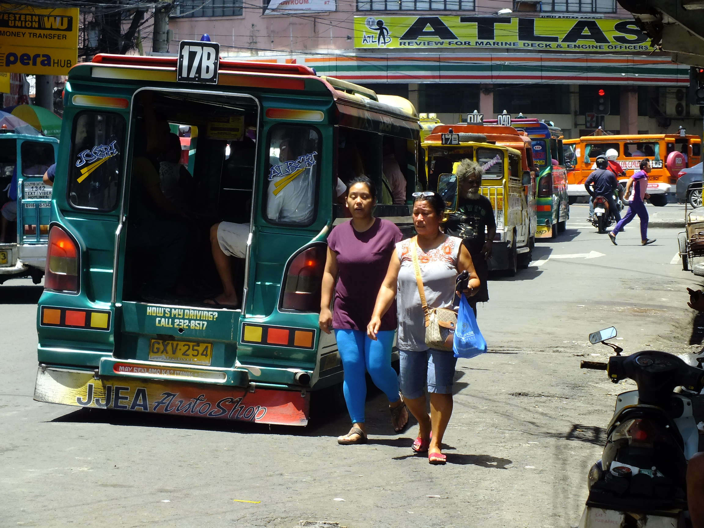 2016-09-27Jeepney in Cebu City